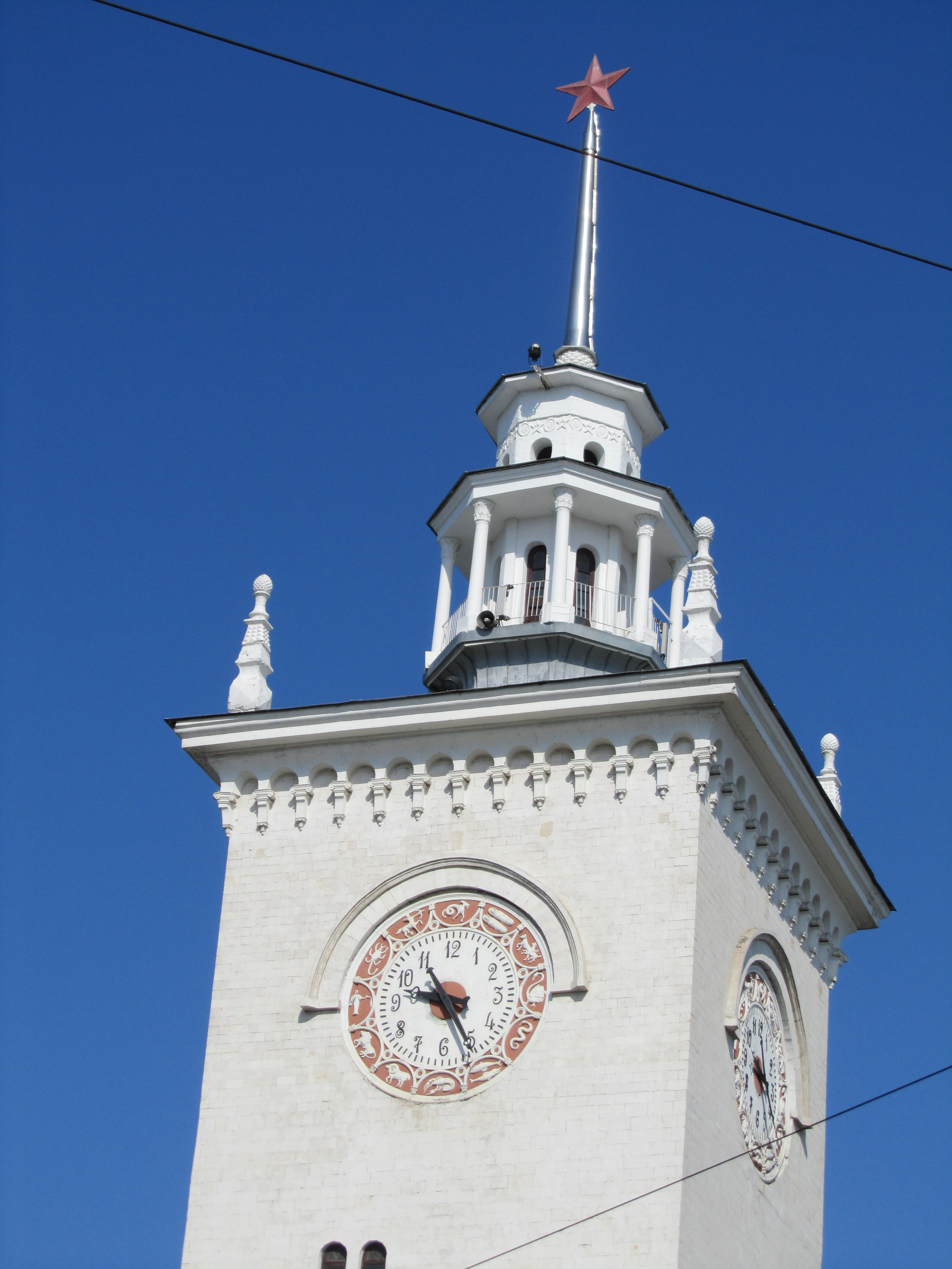 Часы на башне. Ж.д. вокзал. Симферополь. Крым. Август 2010